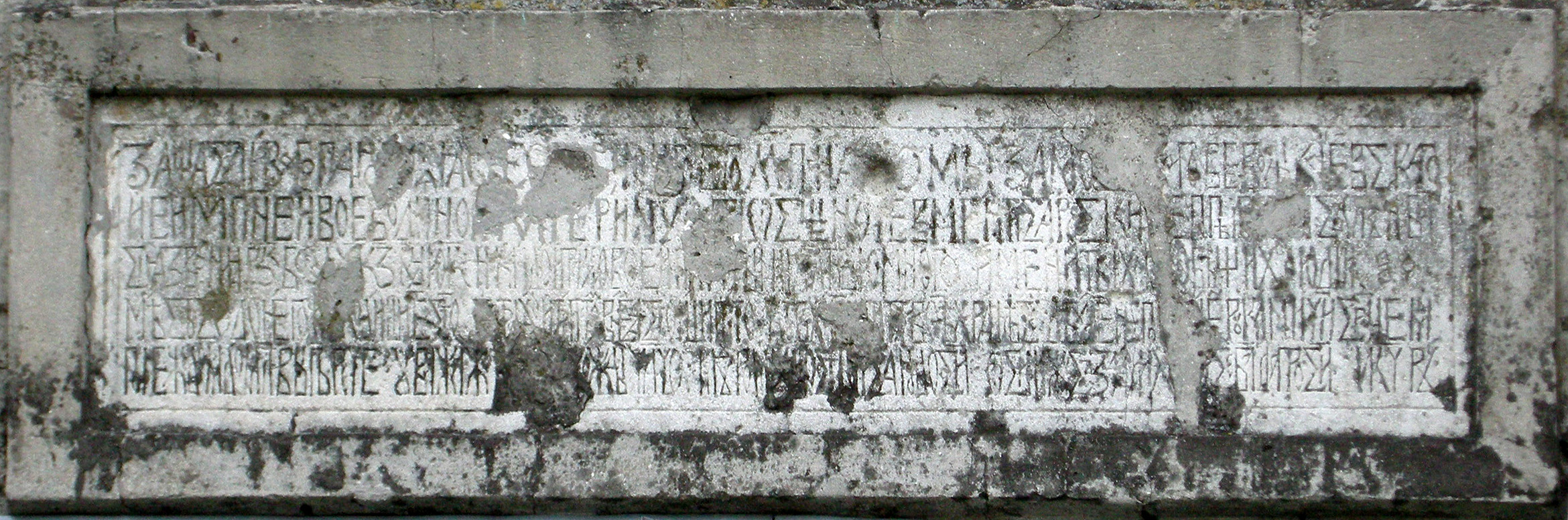 Кам'яна таблиця з написом над вхідними дверима церкви Воздвиження Чесного Хреста в Тернополі.